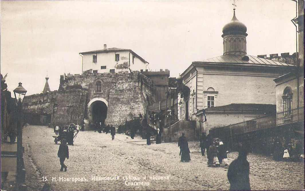 Нижний Новгород. Ивановская башня и часовня Спасителя на Ивановском съезде.